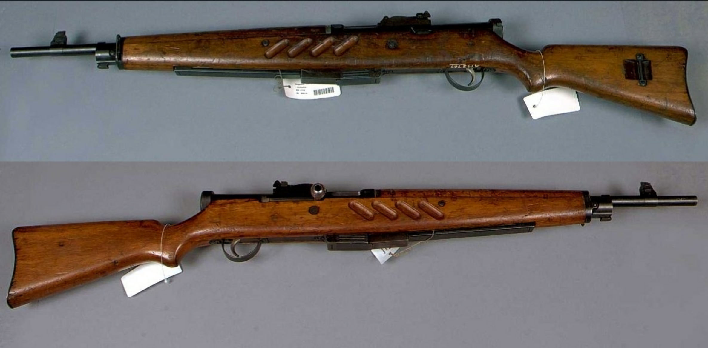 Kulsprutepistol m/1934 Vapnet märkt med (SA) stämpel (Suomen Armeija) och "SS-41". Samhörande nr är 2709-2710: 1 kulsprutepistol, 1 gevärsrem av väv.